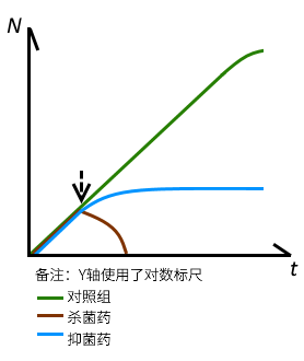 中文（中国大陆）: 一张说明抑菌药与杀菌药区别的简图。